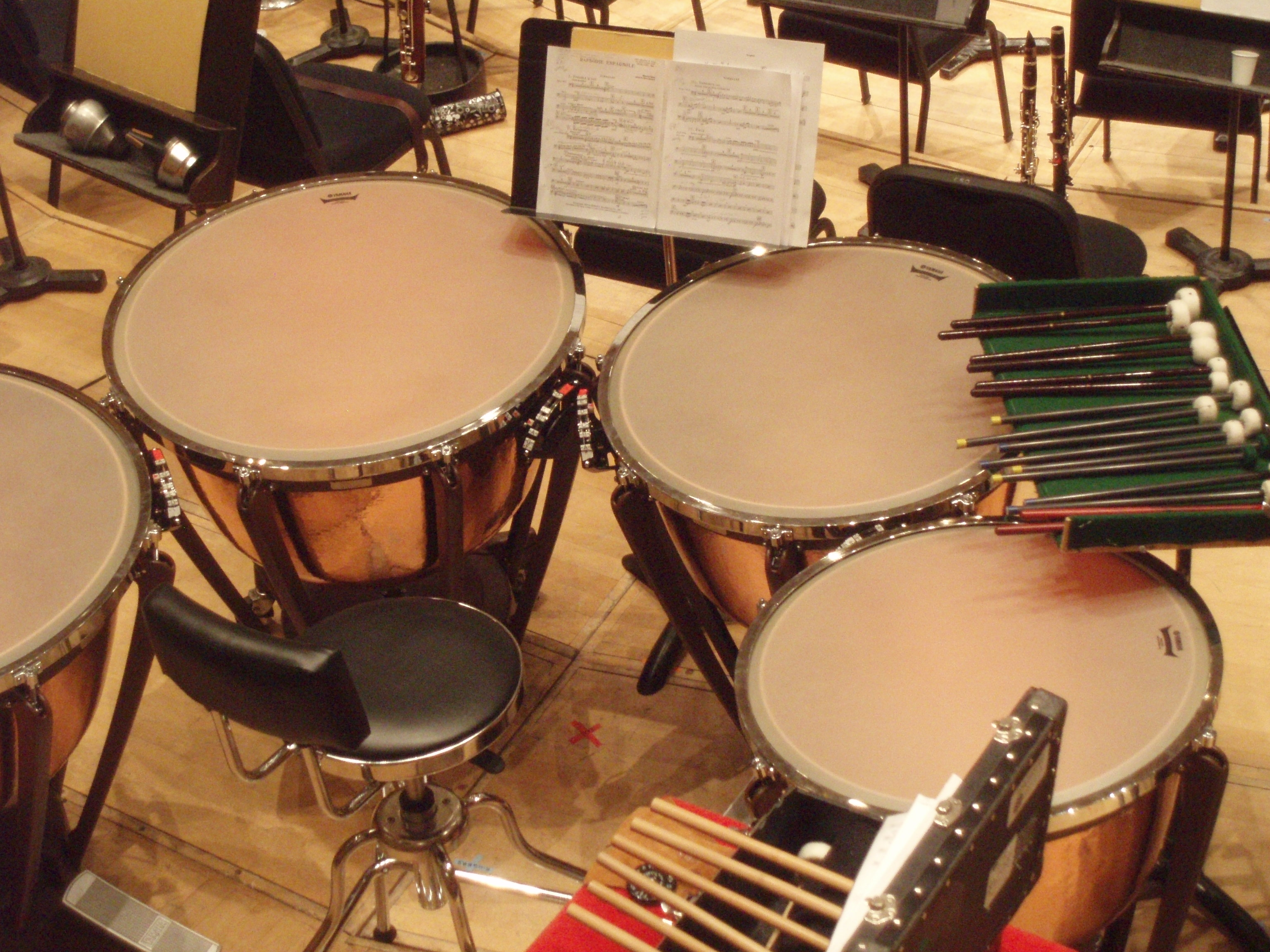 Timbales de la Civic Orchestra of Chicago.